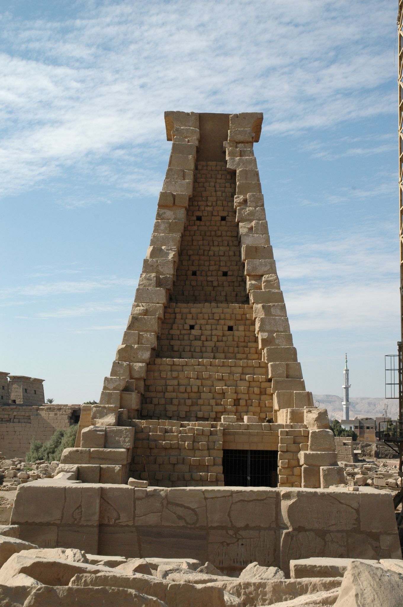 Tempio di Karnak: resti del tempio di Mut